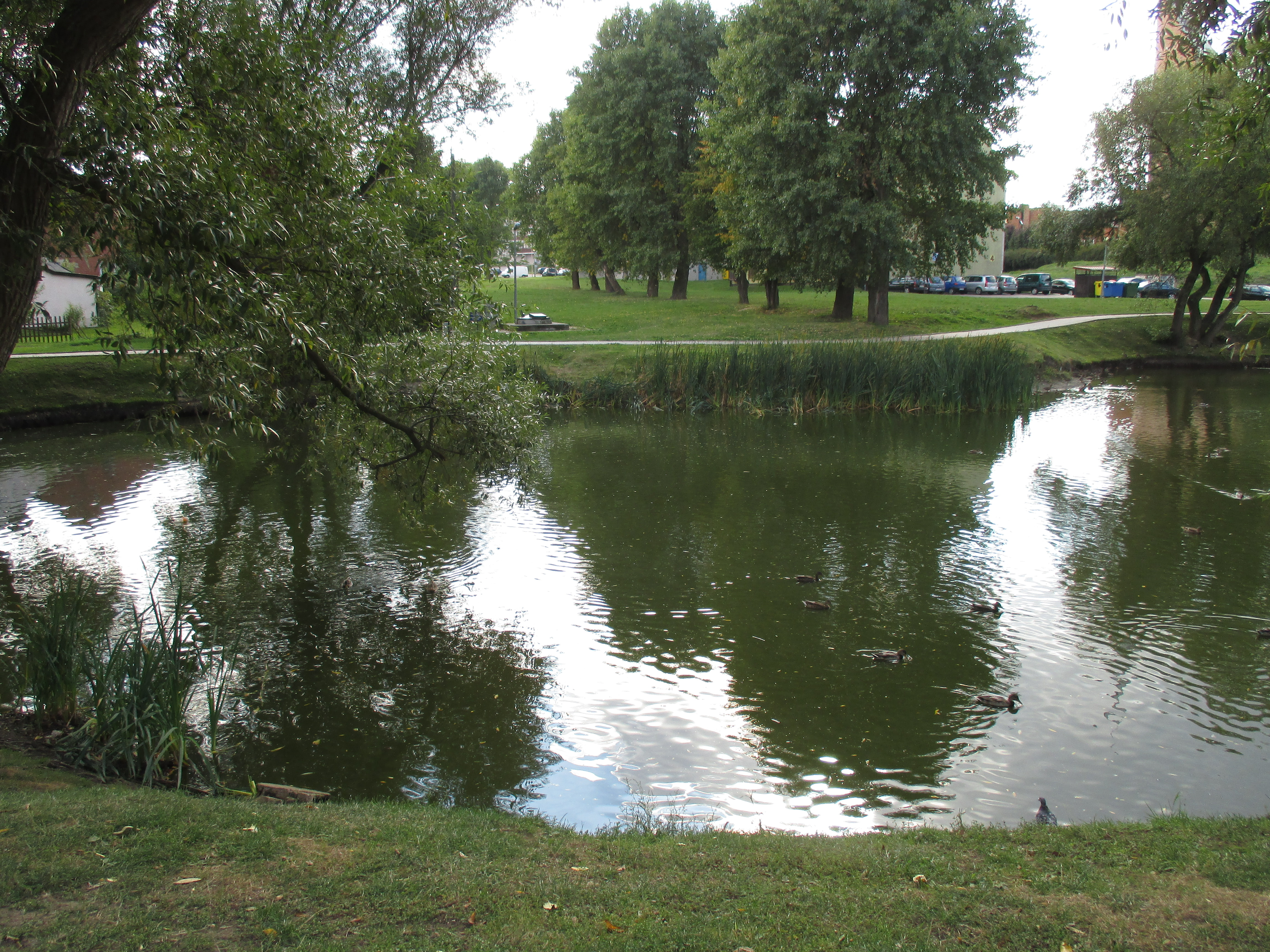 Osiedle Bajkowe w Tczewie, staw przy ul. Piotrowo